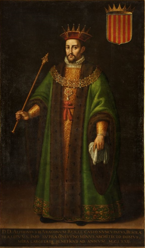 Retrato imaginario del rey Alfonso II de Aragón (1157-1196), que fue hijo del conde Ramón Berenguer IV de Barcelona y de la reina Petronila de Aragón.